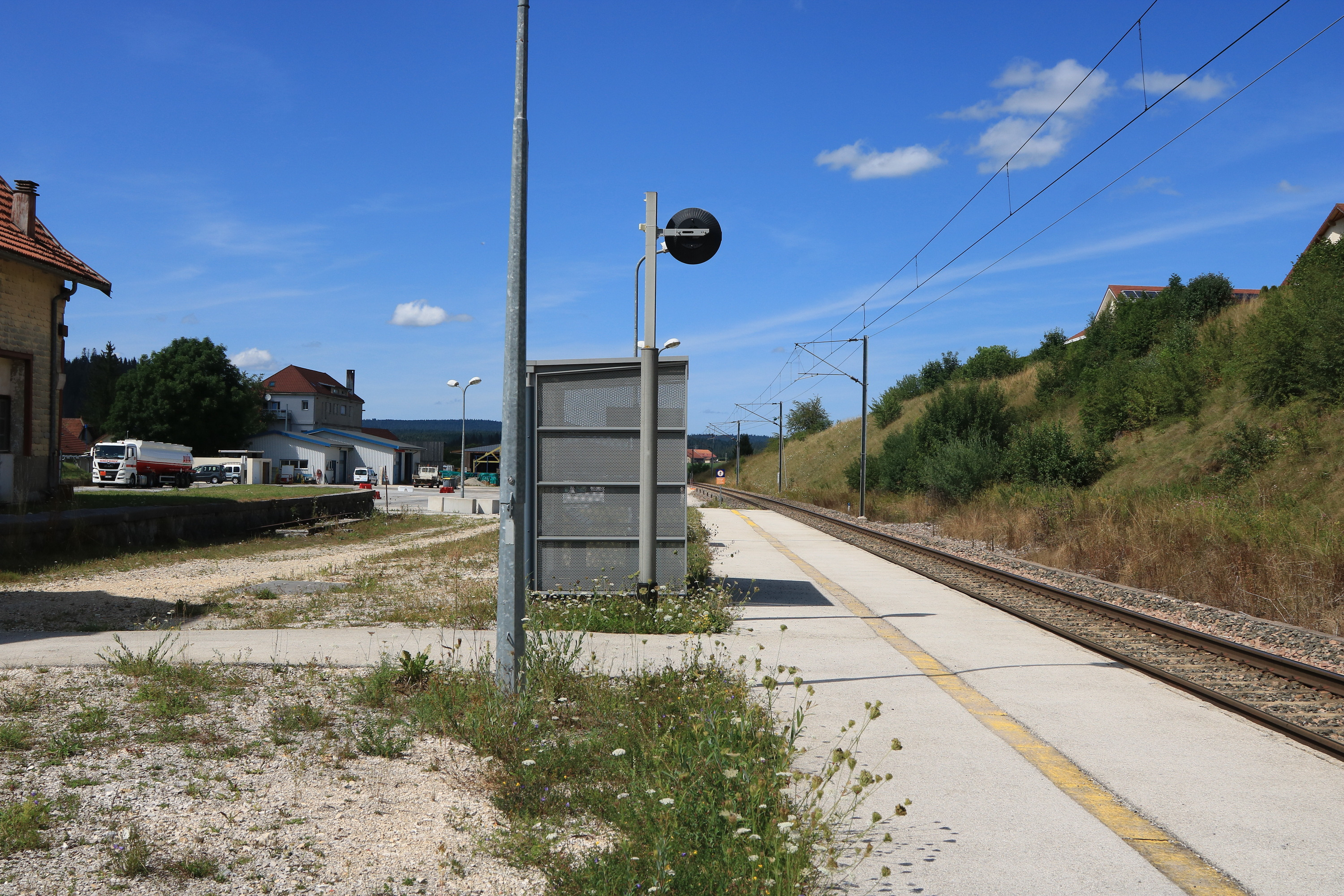 Halte de Labergement-Sainte-Marie vue vers Frasne.